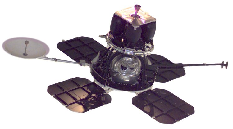 Lunar orbiter 1 (large).